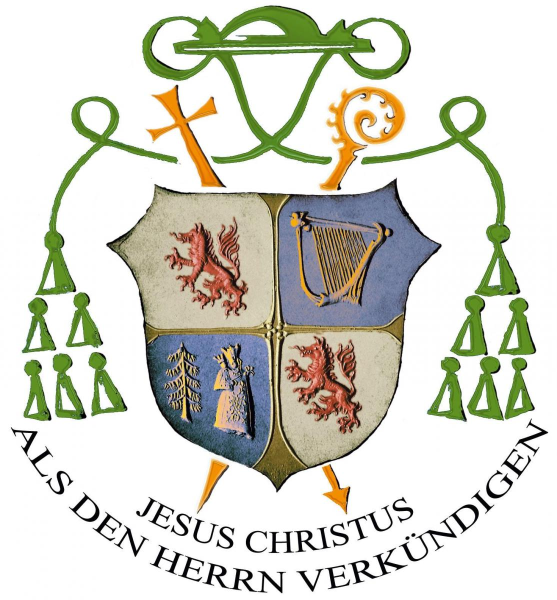 Wappen Bischof Wilhelm Schraml, Bischof von Passau seit 2001 ABP/04.Ge/Bf-Siegel-Wappen/Bf2002_Wilhelm_Wappen.jpg Wilhelm: „Jesus Christus als den Herrn verkündigen“